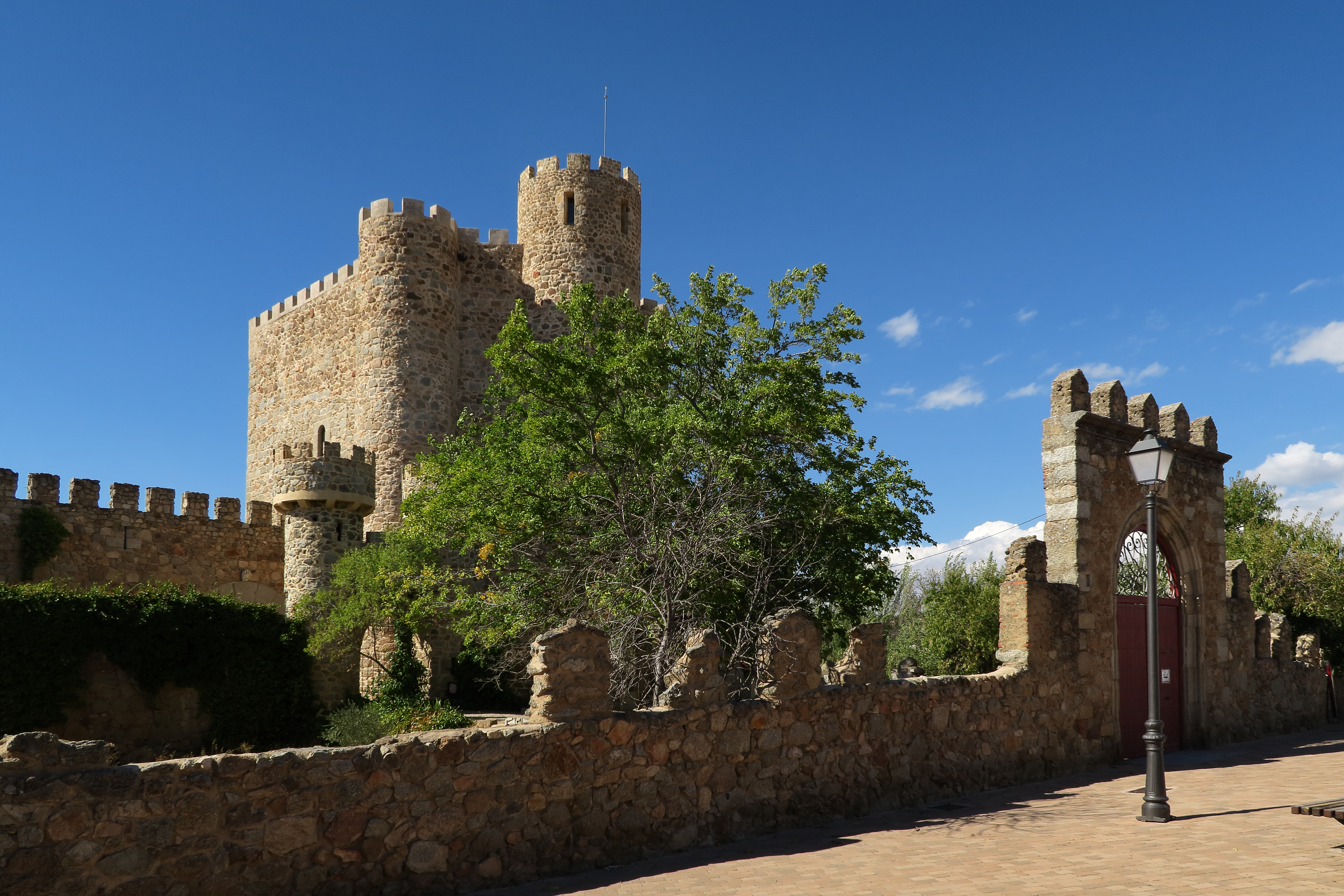 Castillo de la Coracera (San Martín de Valdeiglesias)